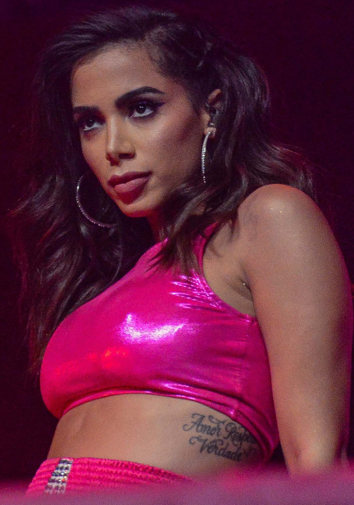 Anitta na festa "Combatchy"